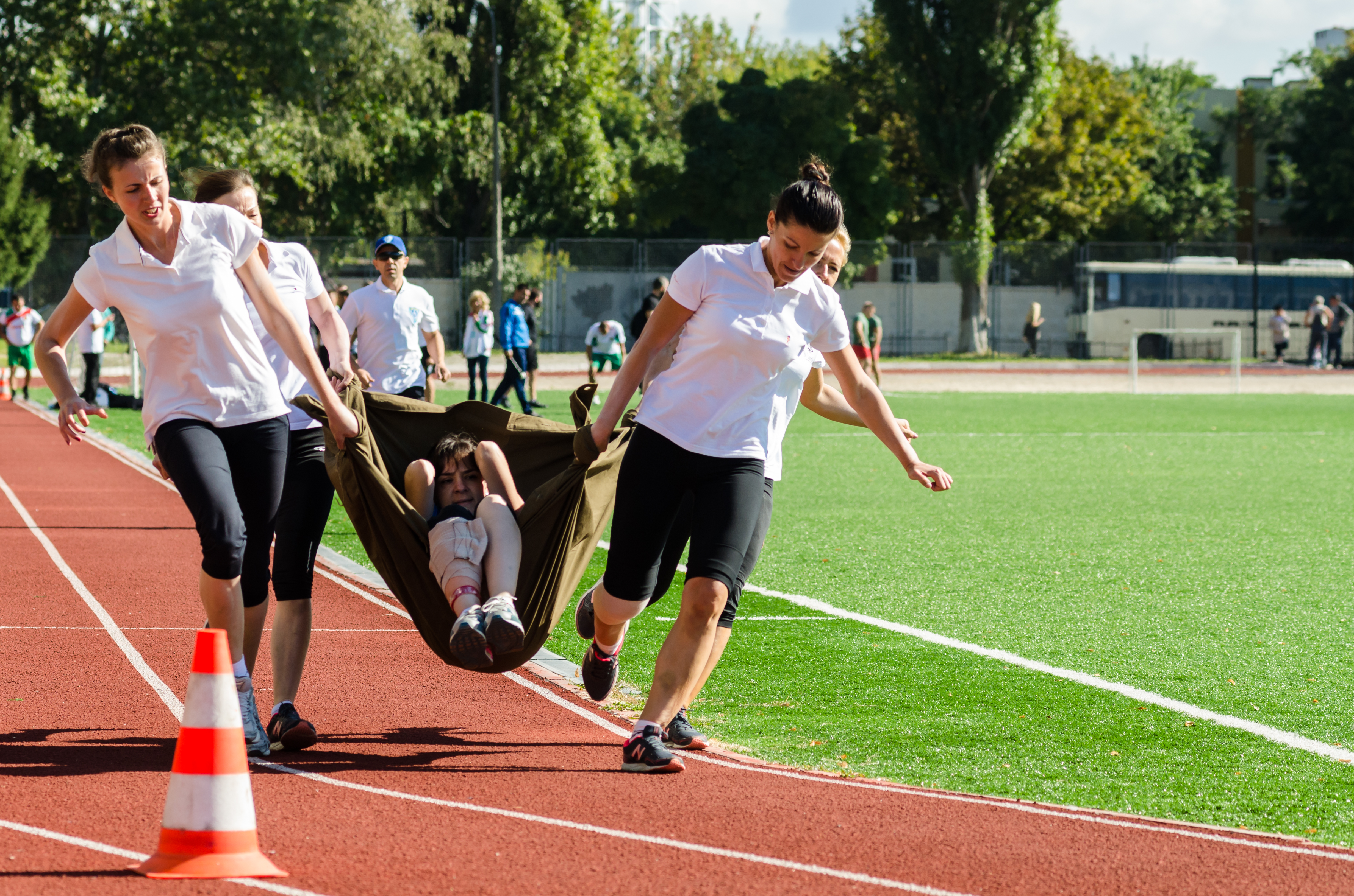 Жіноча команда виконує вправу з дисципліни під час Чемпіонату України з багатоборства тілоохоронців